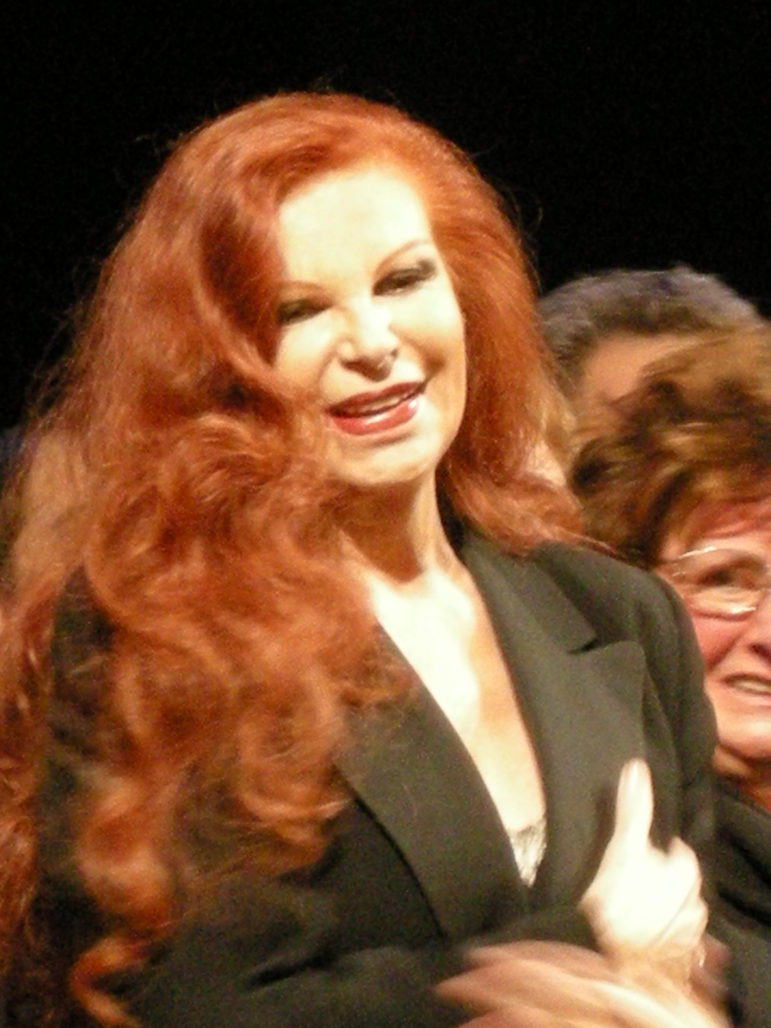 Milva in Pistoia 31-01-09